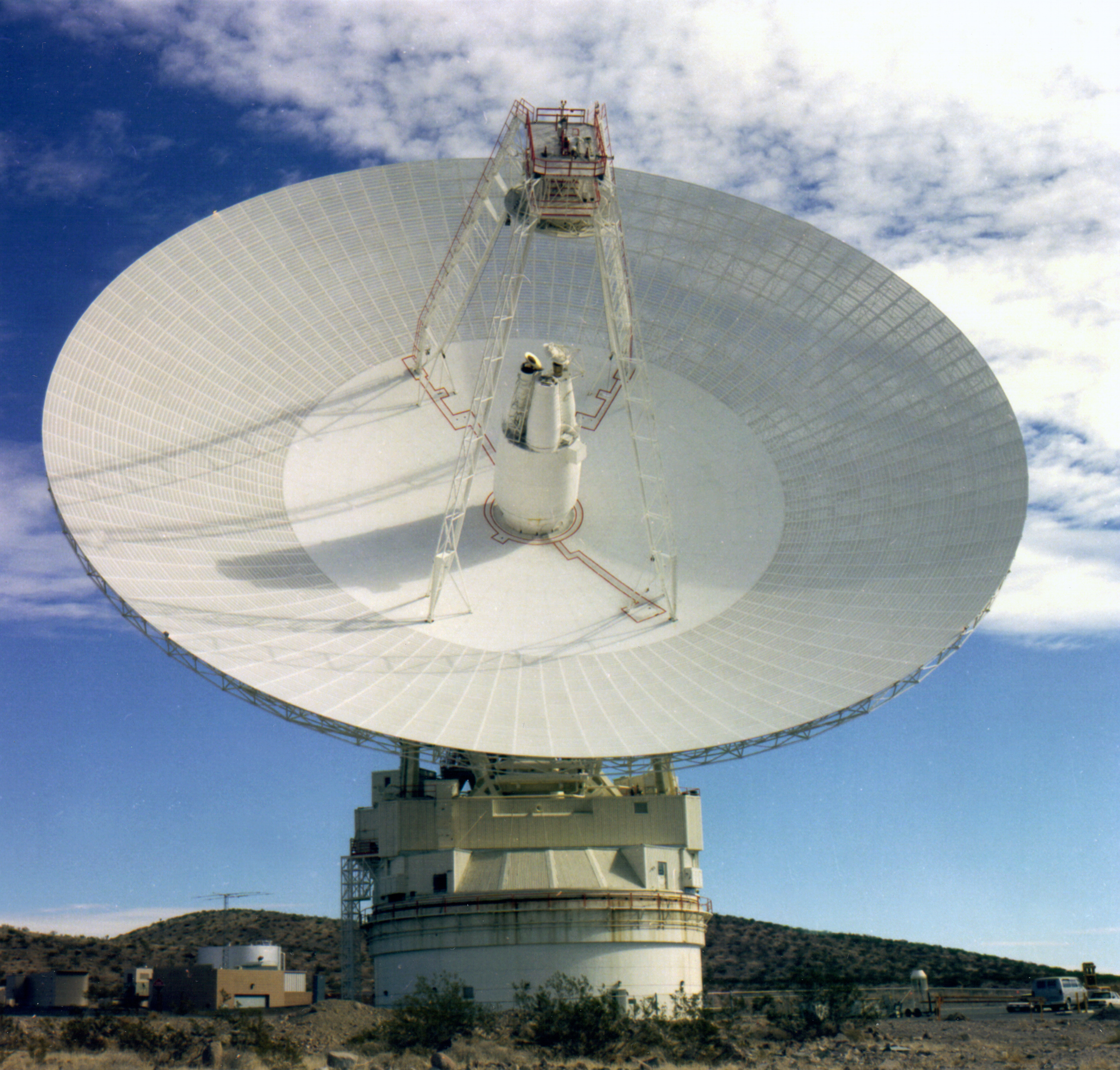 A 70m (230 ft) Antenna in Goldstone